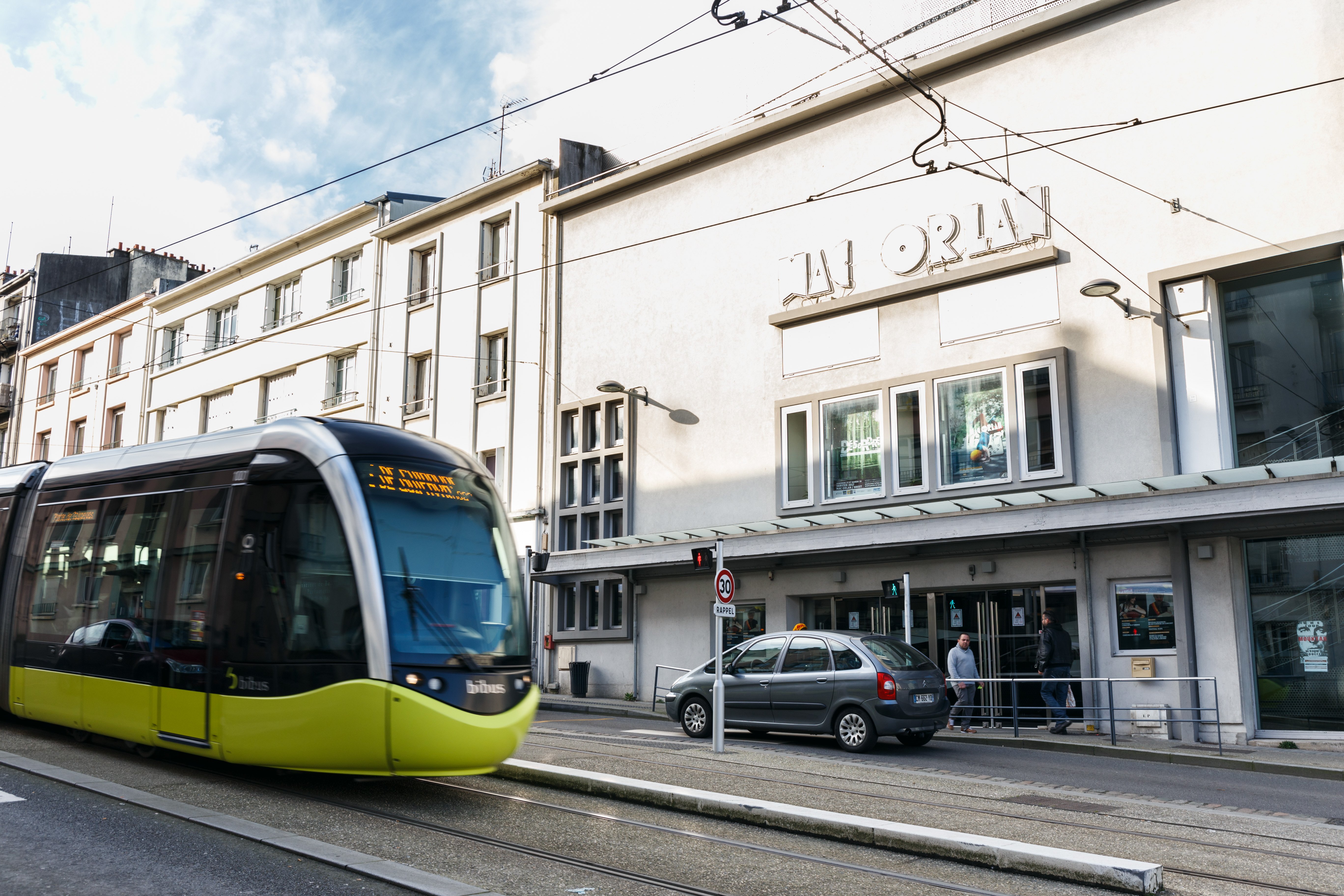 Le Mac Orlan, théâtre municipal situé rive droite à Brest, construit en 1958 et rénové en 2011.